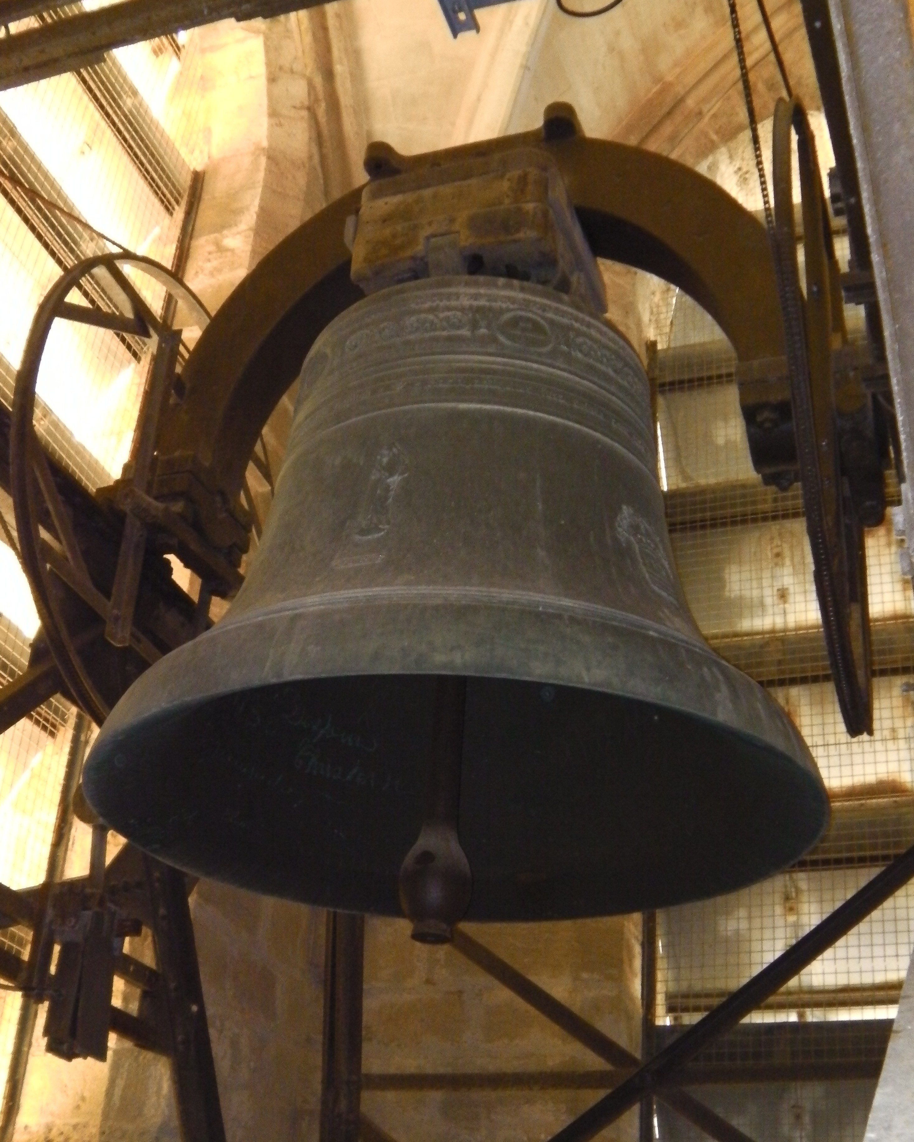 Le bourdon de la cathédrale Saint-Nazaire de Béziers (France)